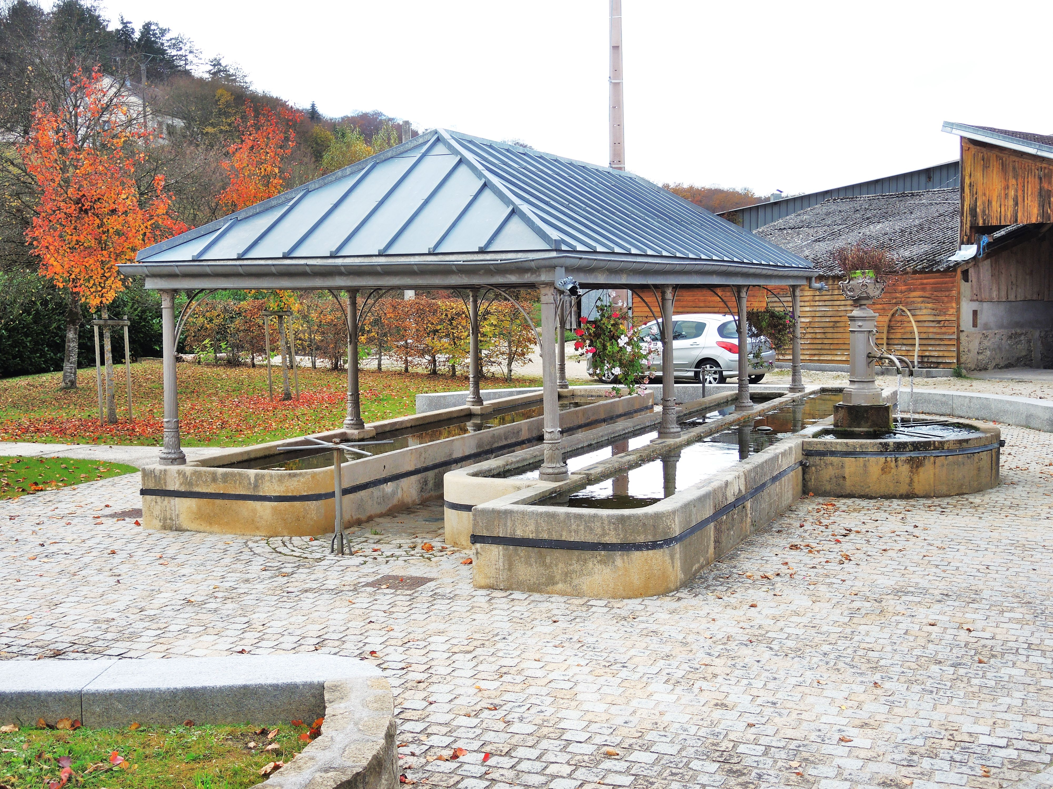 Fontaine-lavoir du bas du village d'Allondans. Doubs